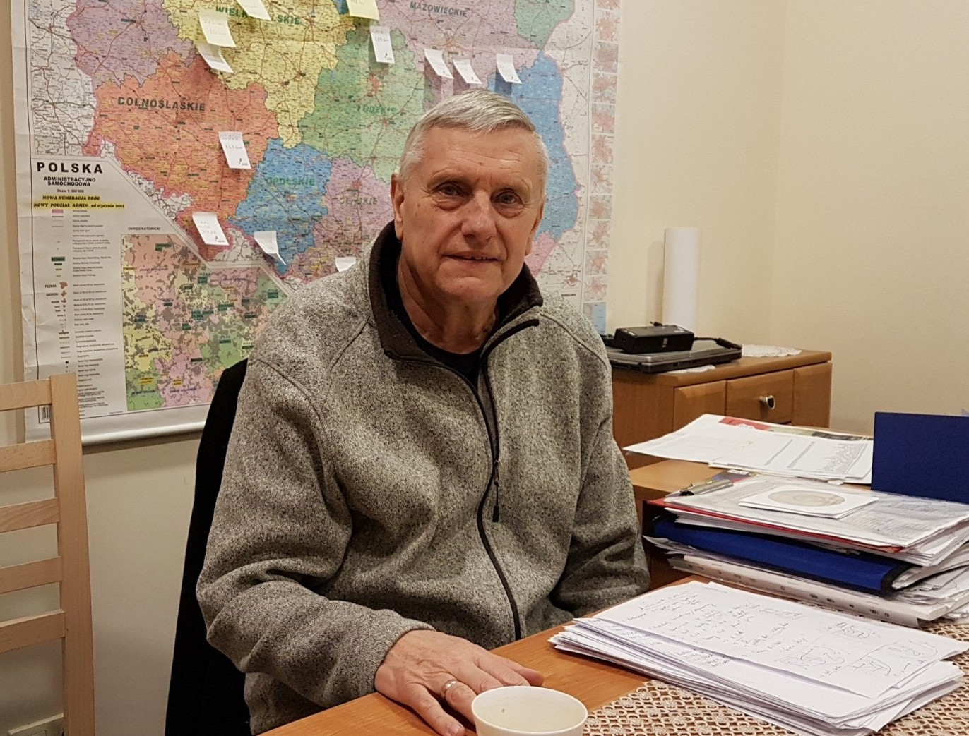 Romuald Żukowski